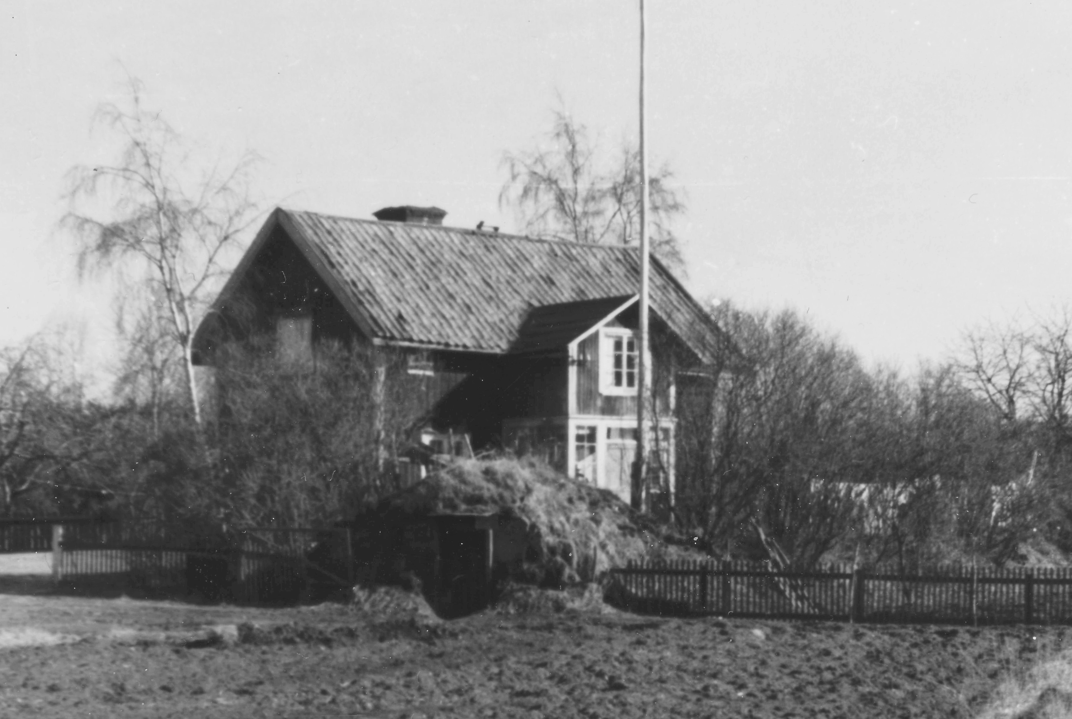 Torpet Nytorp i nuvarande stadsdelen Kärrtorp (riven).